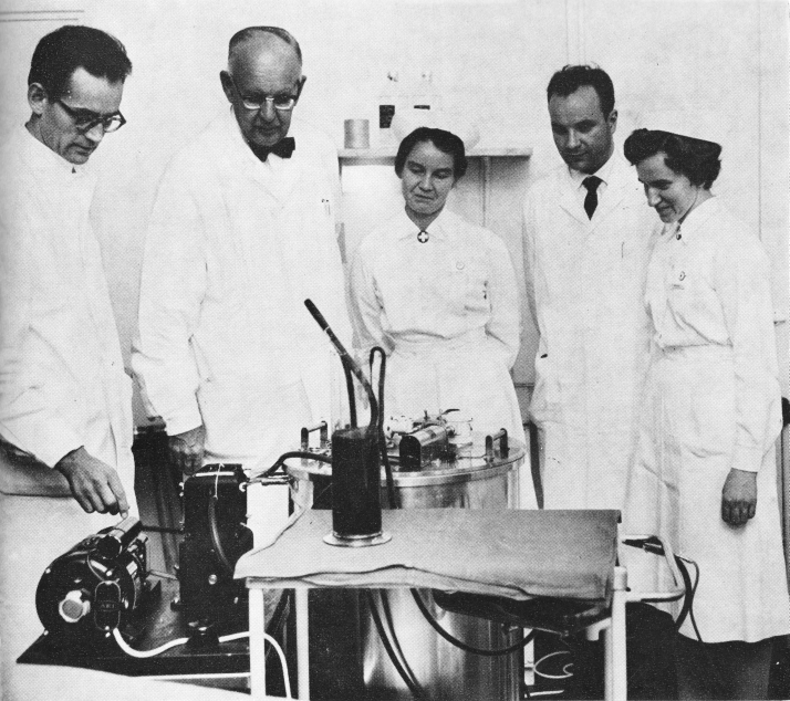 Professori Bertel von Bonsdorff (1904–2004) työtovereineen esittelee Suomen ensimmäistä keinomunuaista HYKSin sisätautien klinikalla Marian sairaalassa.